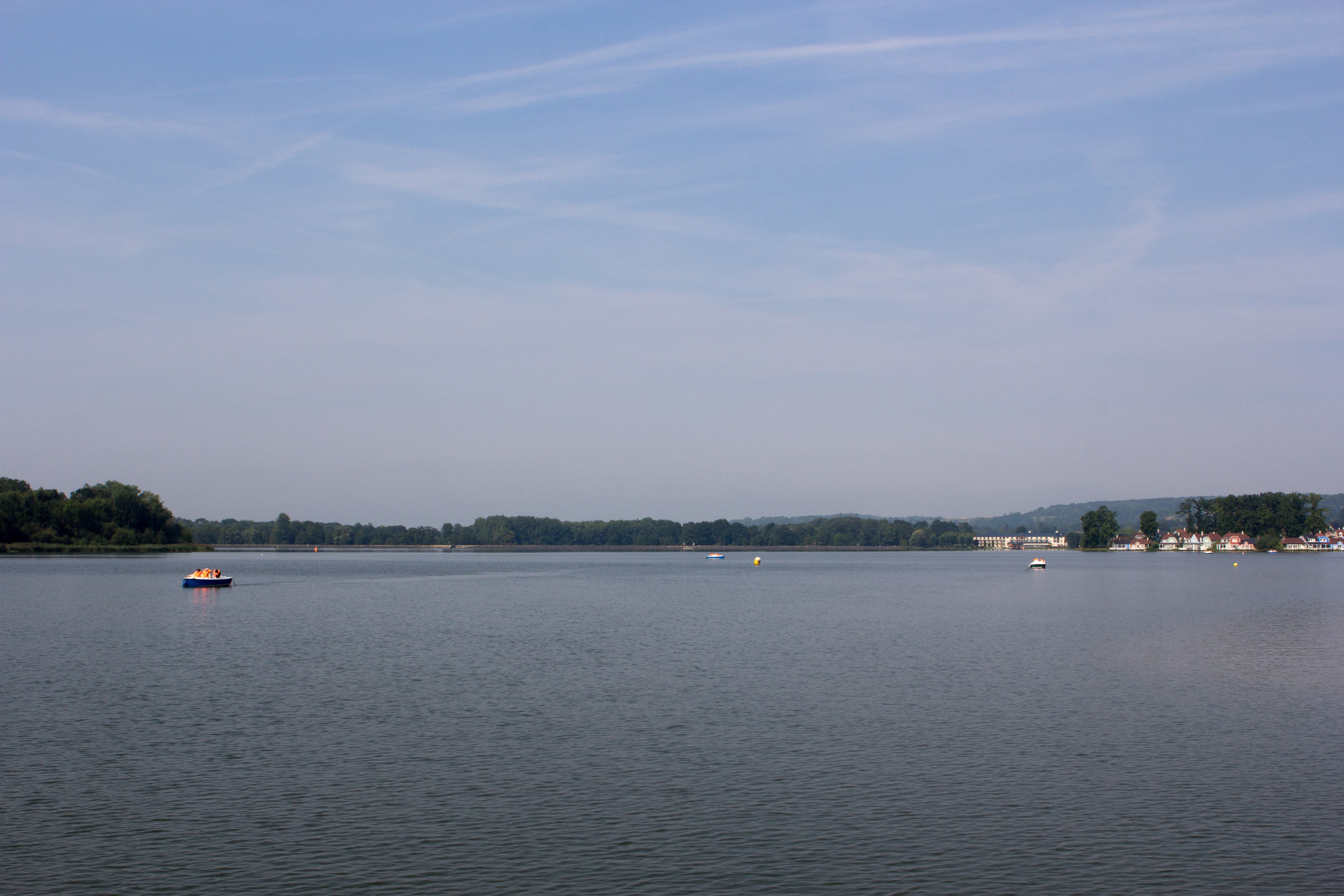 Center Parcs, Domaine du Lac d'Ailette, Chamouile, Aisne, France